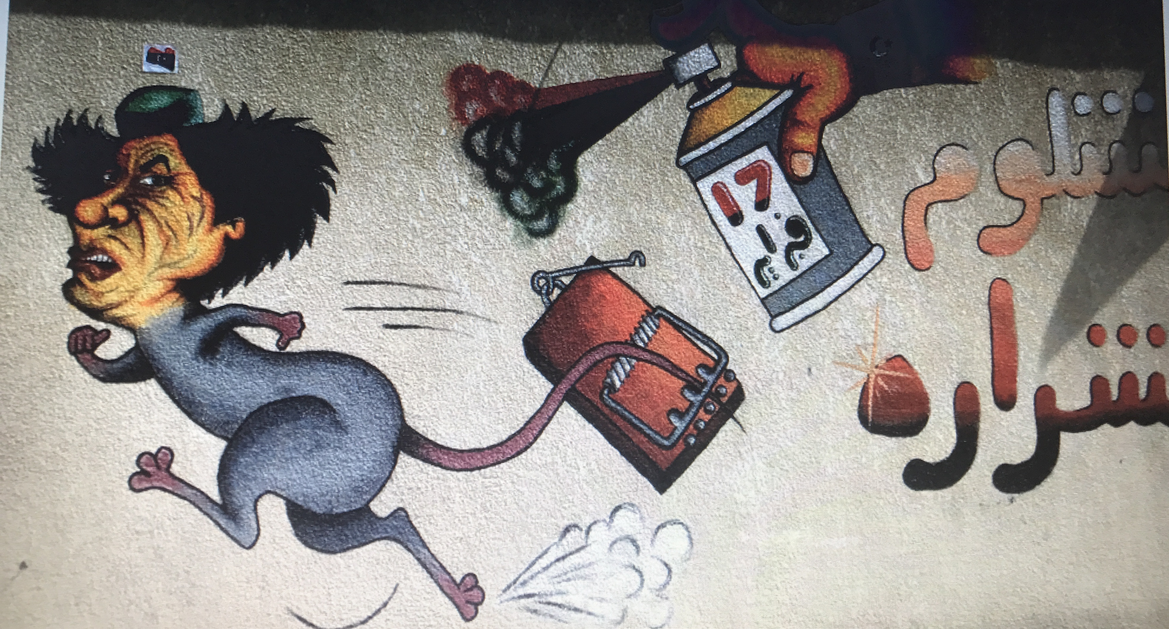 Graffiti ilustrându-l pe Muammar Gaddafi fugind după Revoluția de la 17 februarie 2011 din Tripoli, Libia